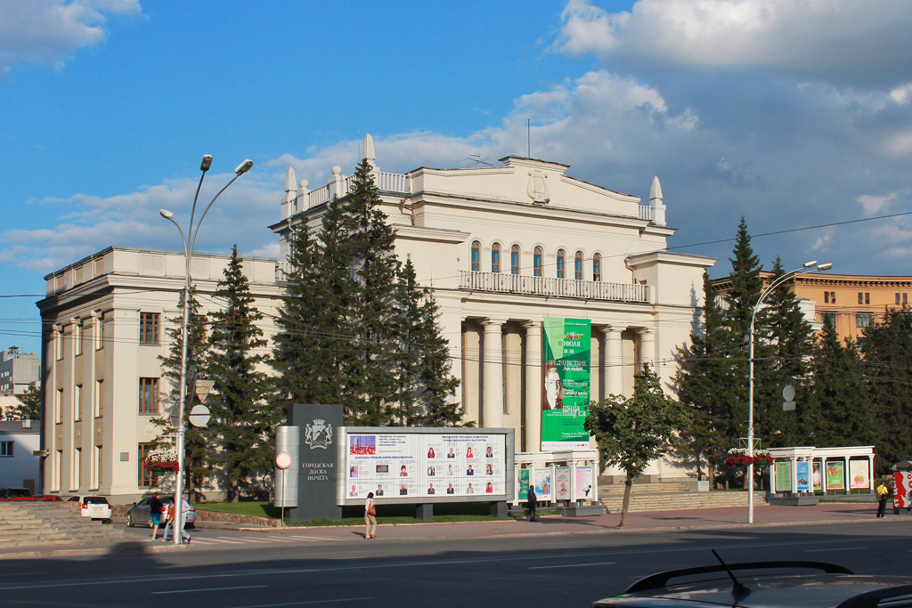 Дом-памятник В. И. Ленину — »Дом Ленина», сооруженный в 1925 году на средства трудящихся города (Новосибирская область, Новосибирск, Красный пр., 32)